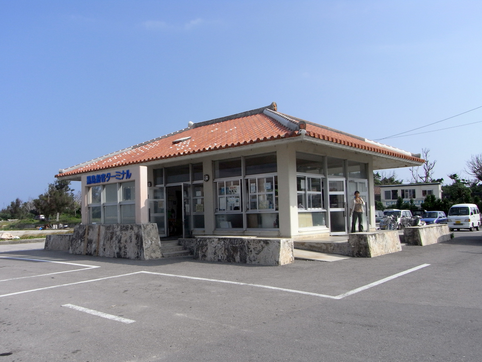 黒島港ターミナル（沖縄県八重山郡竹富町黒島）